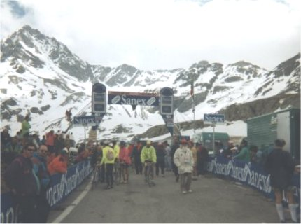 Il Passo del Gavia (Giro d'Italia 1998)